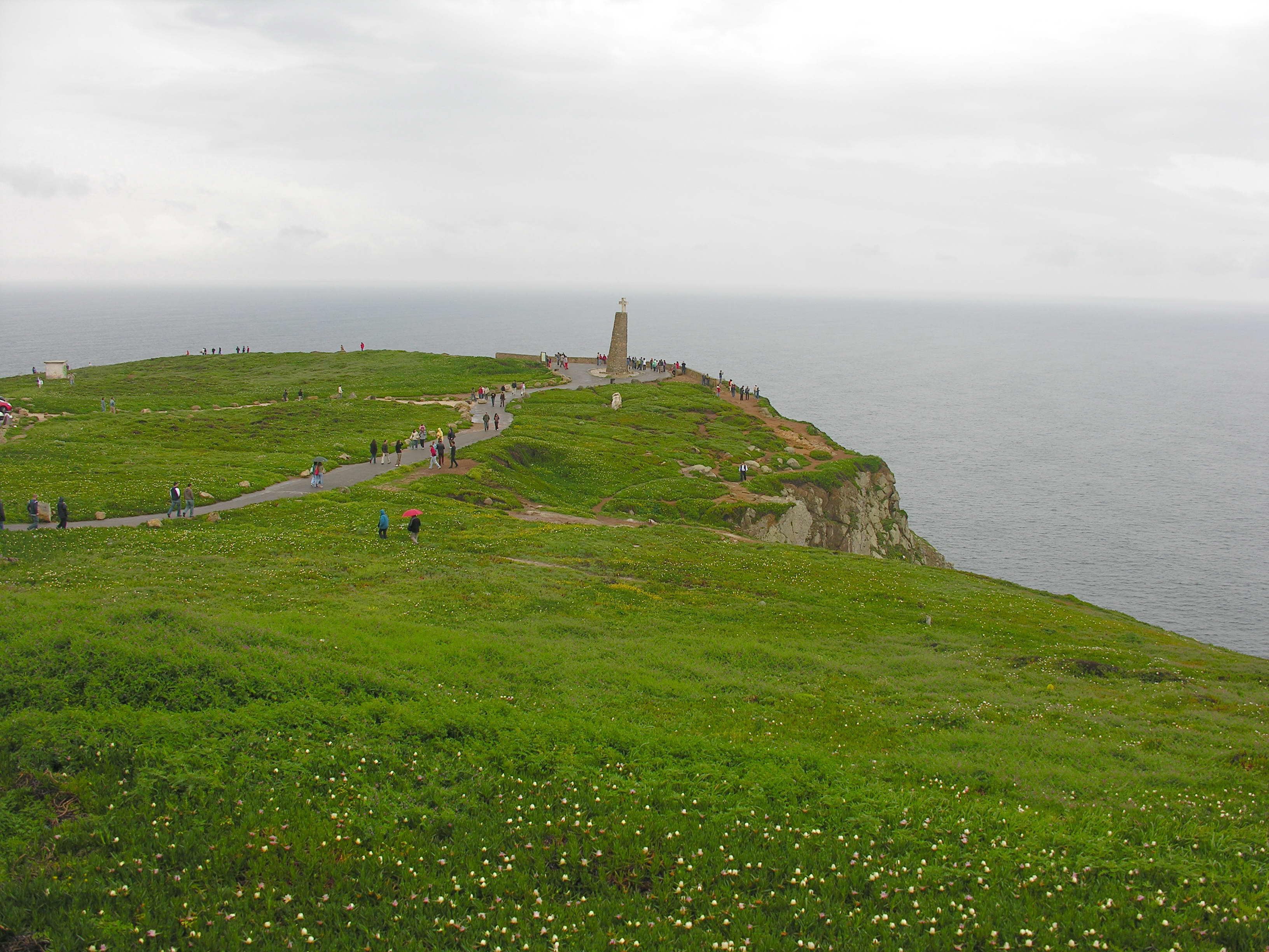 Cabo da Roca, Sintra, Portugal